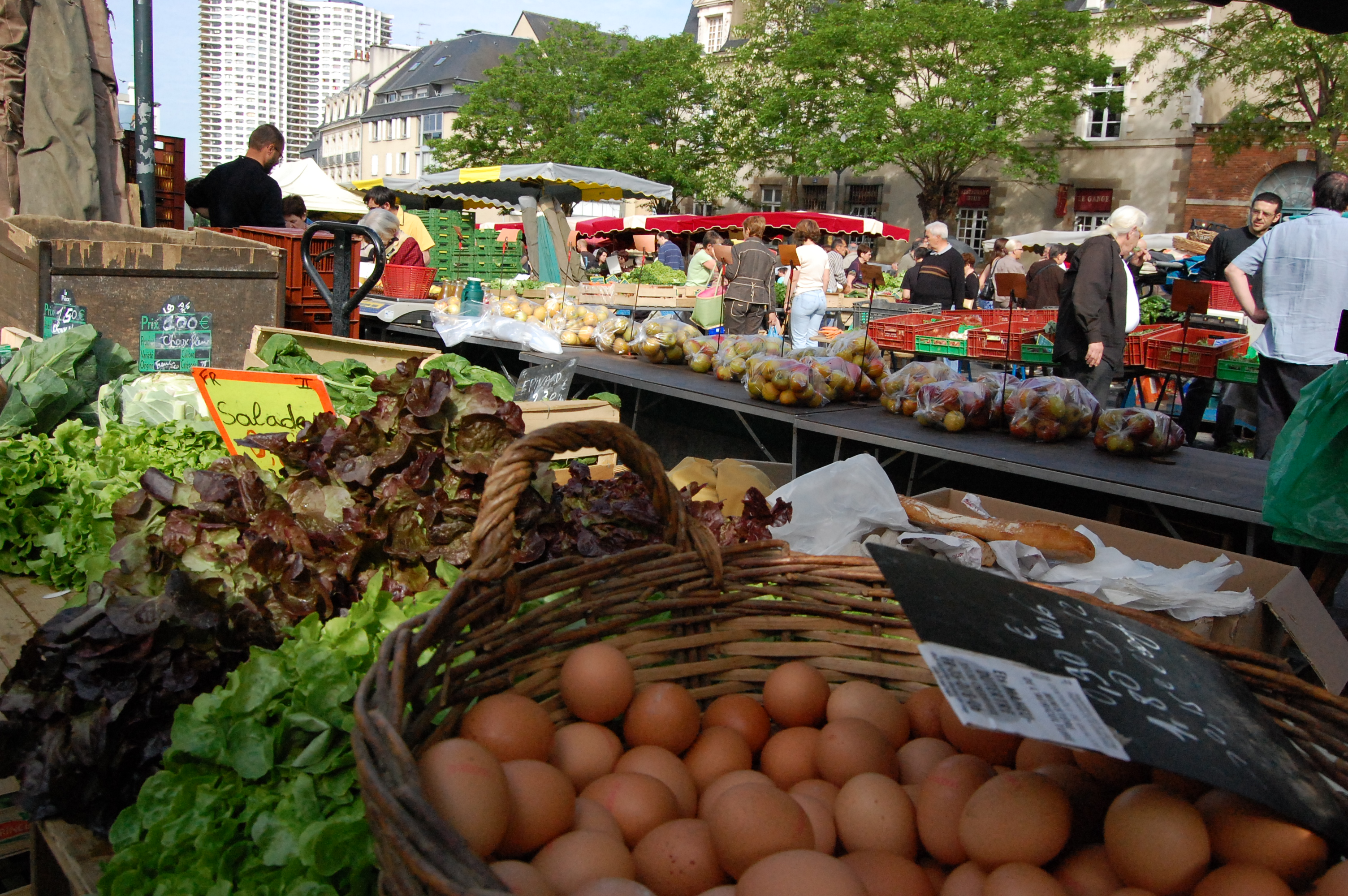 Marché des Lices, étals